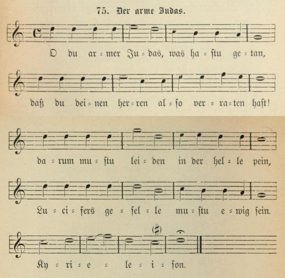 Die im ausgehenden Mittelalter populäre Strophe O du armer Judas in der Edition von Rochus von Liliencron